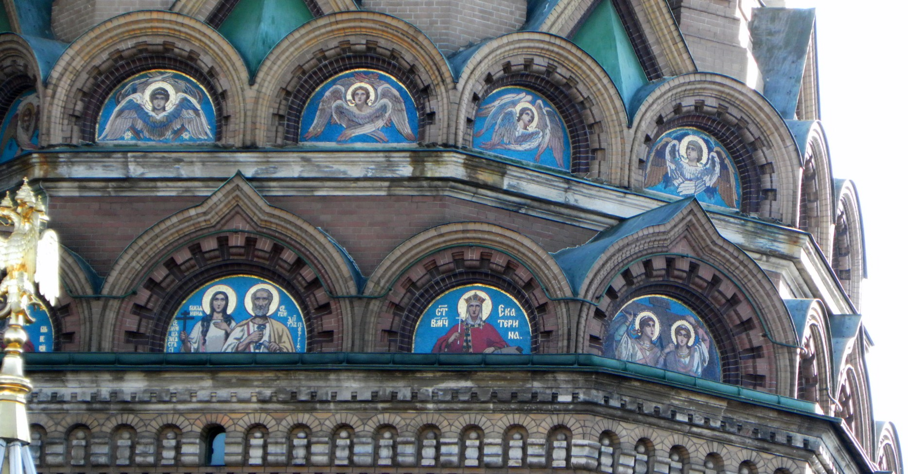 Фрагмент храма.